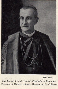 Cardinale Gennaro Granito Pignatelli di Belmonte